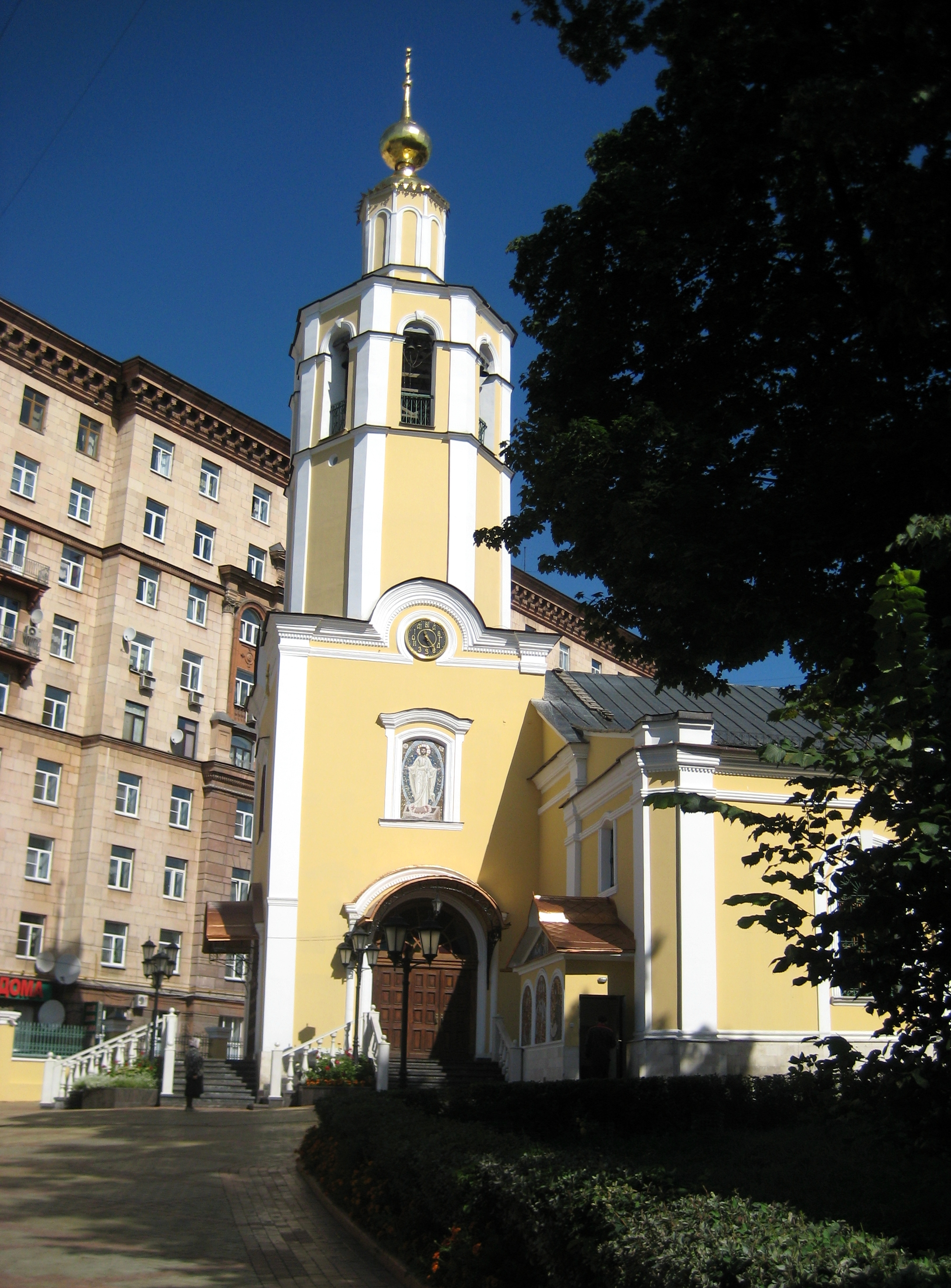 Храм Всех Святых во Всехсвятском